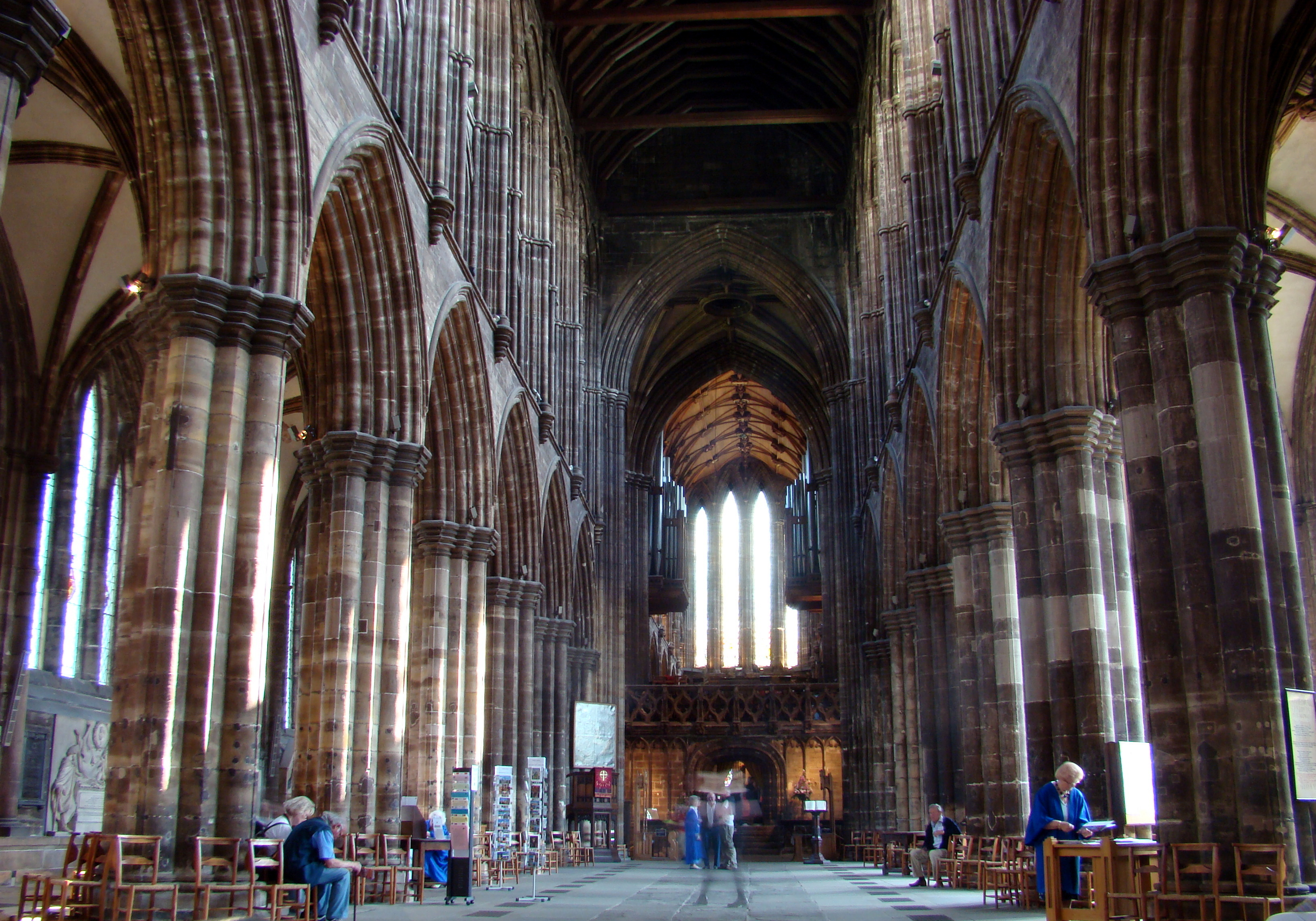 Glasgow, St. Mungo`s Kathedrale im Inneren